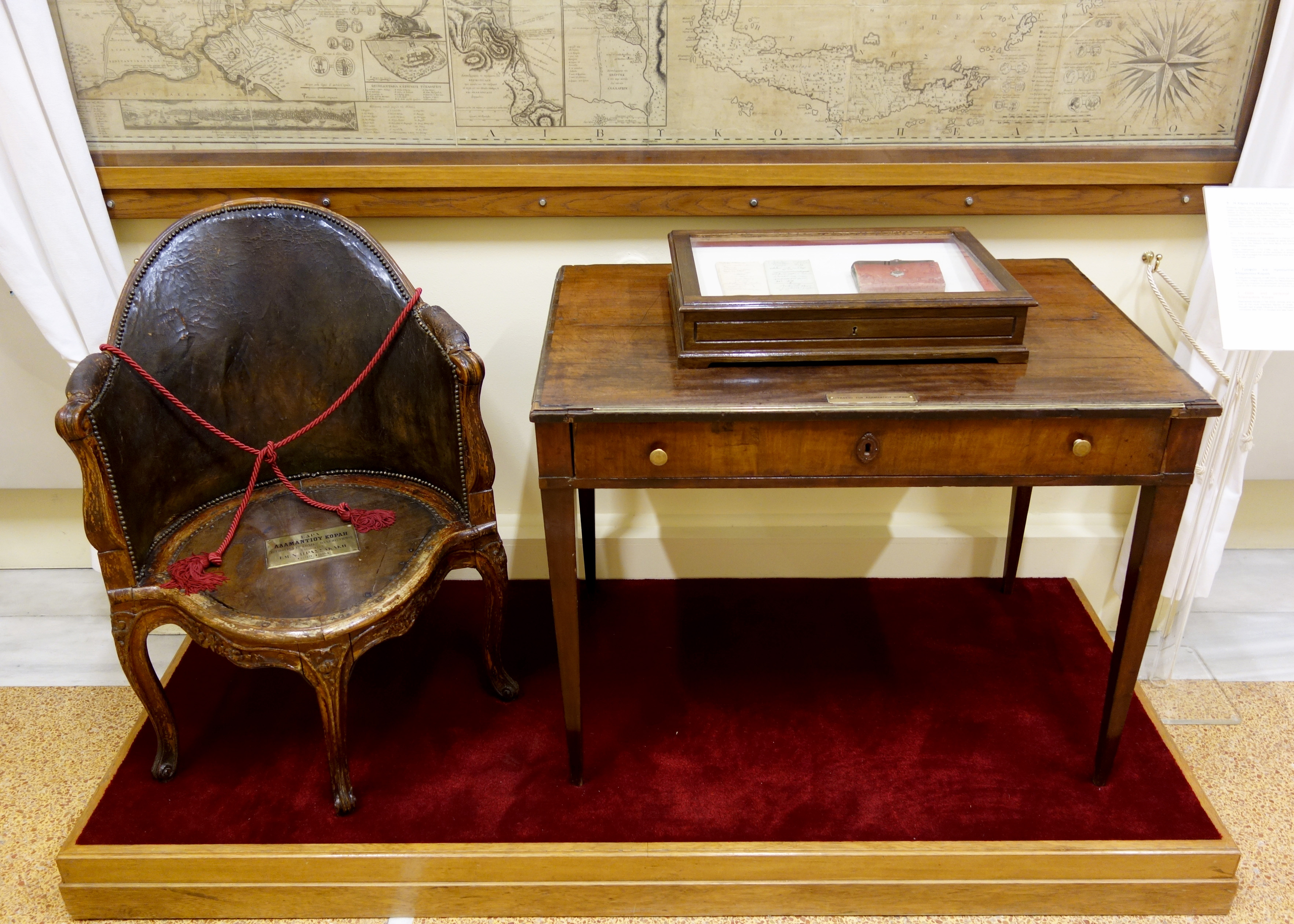 Η έδρα και το γραφείο του Αδαμάντιου Κοραή. Από την μόνιμη έκθεση του Εθνικού και Ιστορικού Μουσείου.